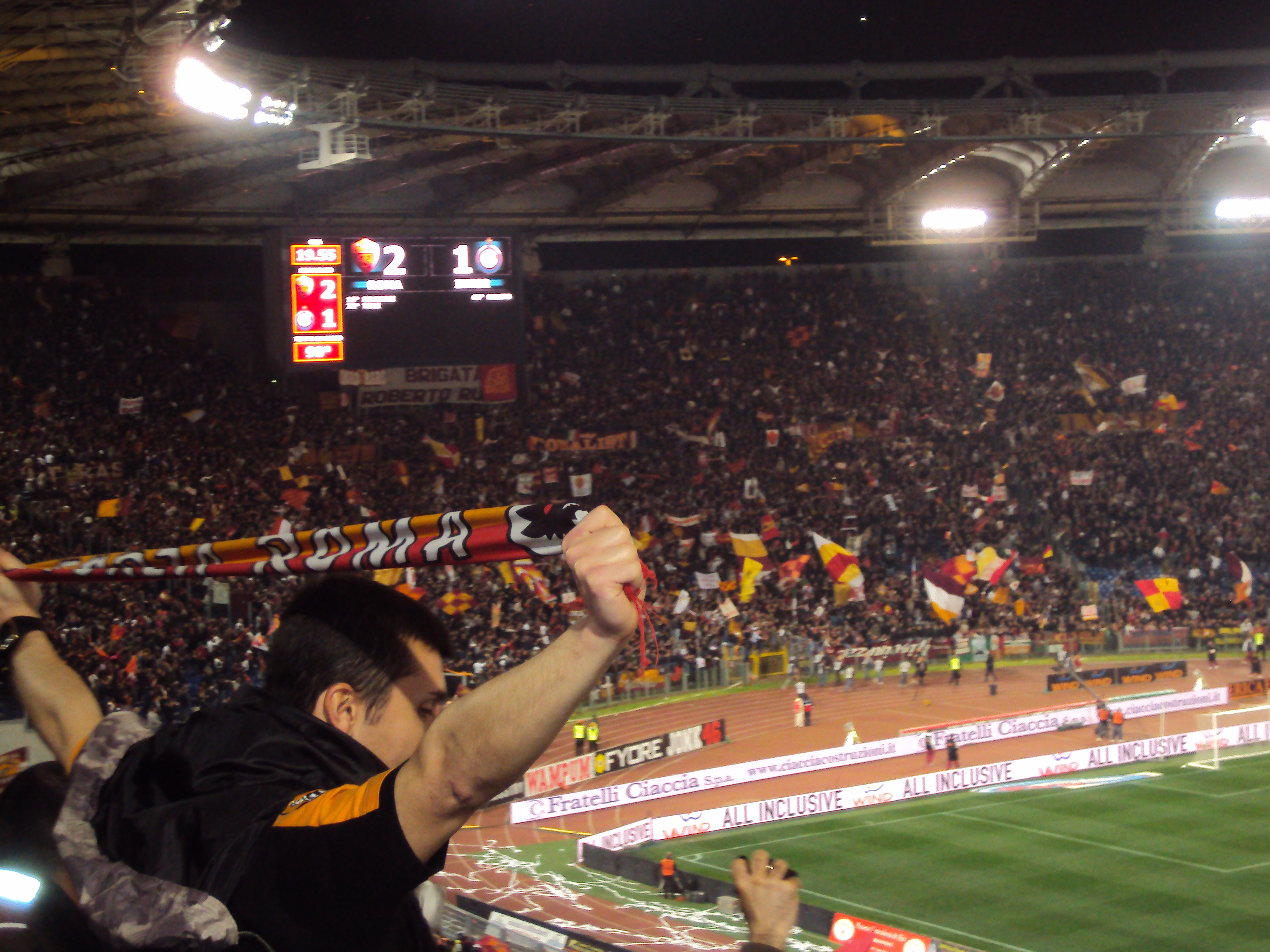 Roma-Inter 2-1